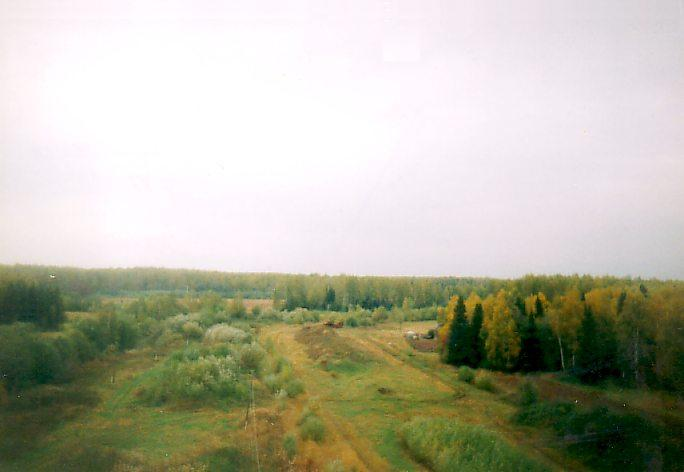 Поломська вузькоколійна залізниця